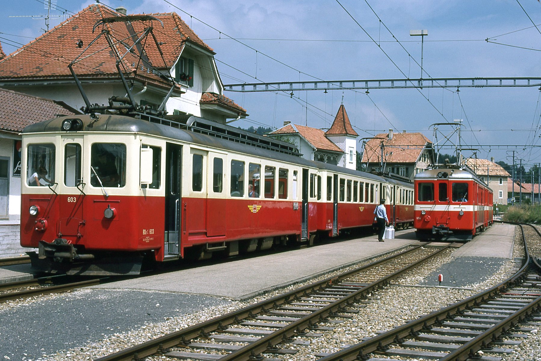 Photo: Trams aux Fils. Prise en août 1977 La ligne du C.J. Chemin de Fer du Jura à été construite entre 1884 et 1913 à voie métrique, sa longueur et de 51,1 Kilomètres